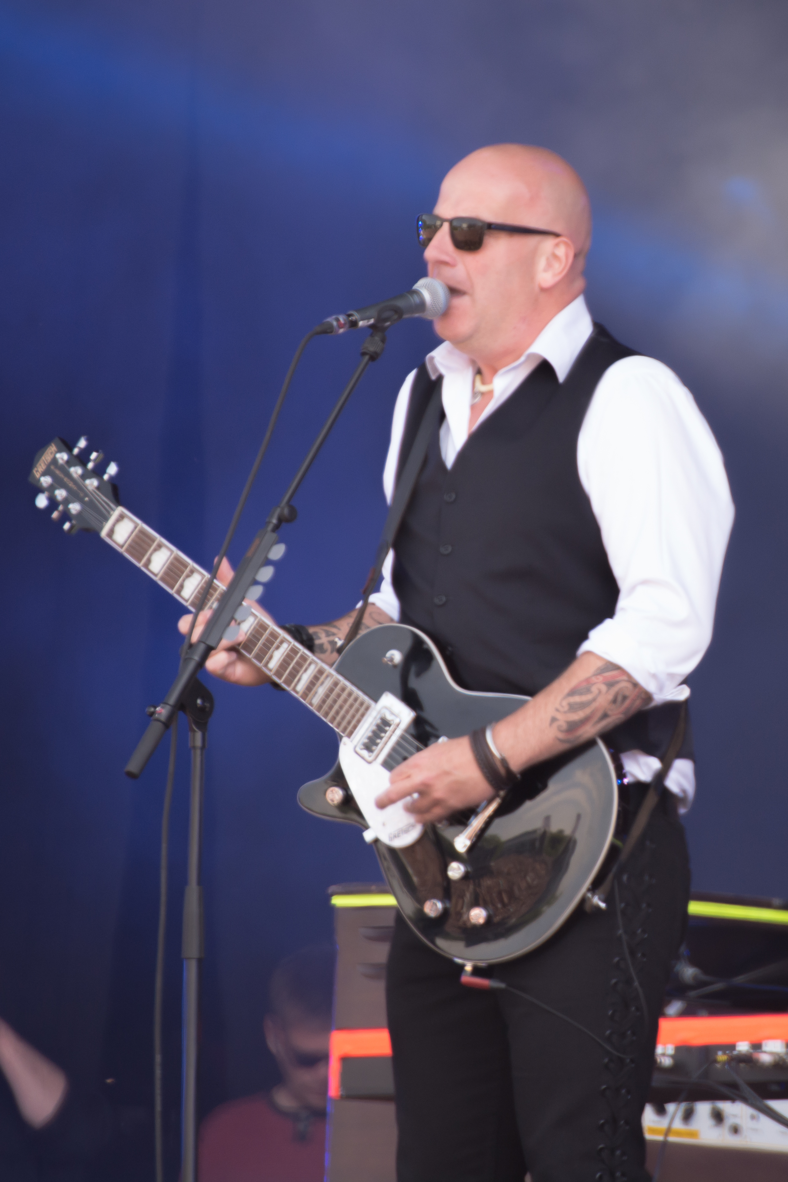 Paskal Jakobsen tijdens het Bevrijdingsfestival op 5 mei 2014 te Zwolle